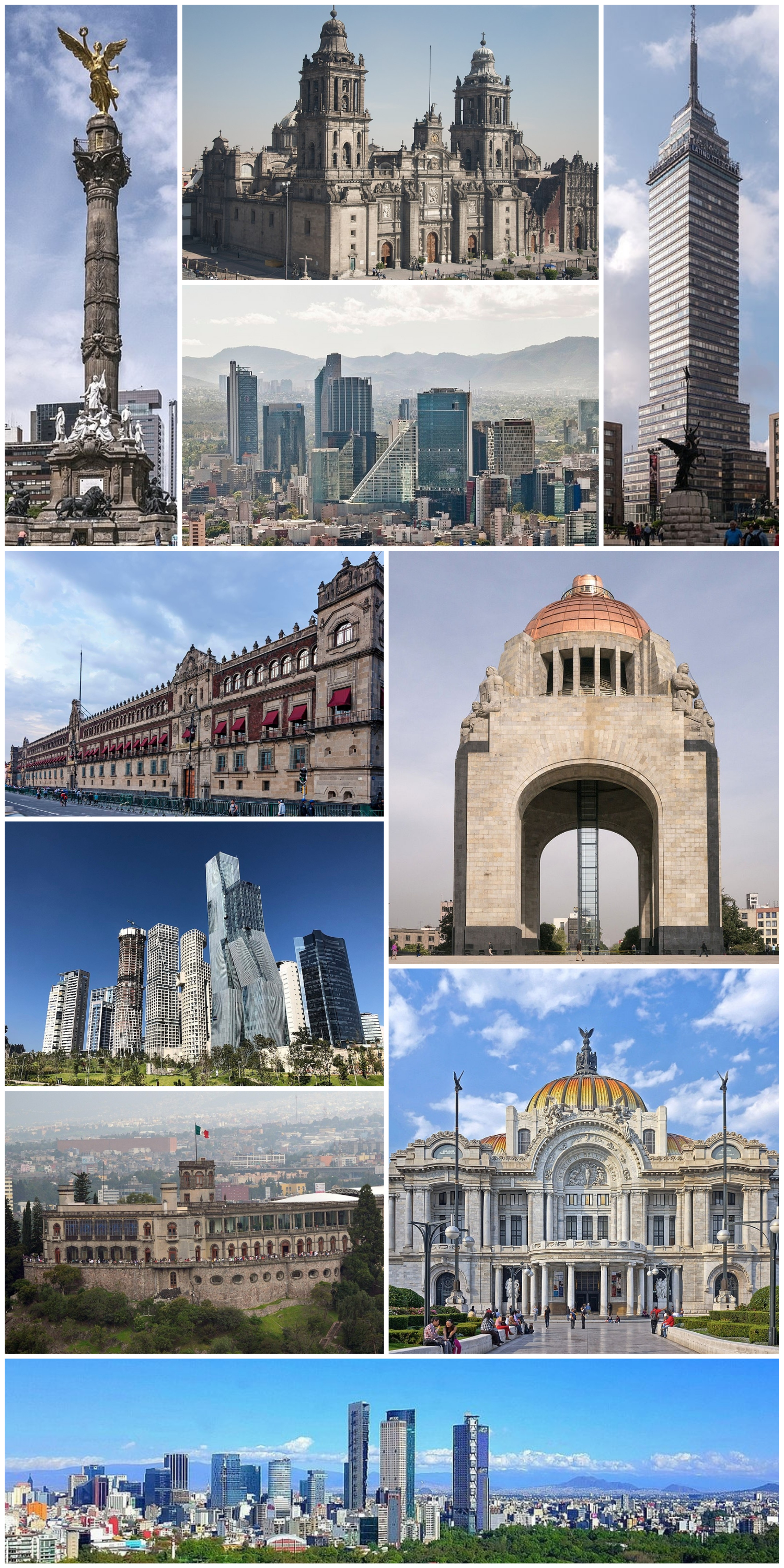 Ciudad de México